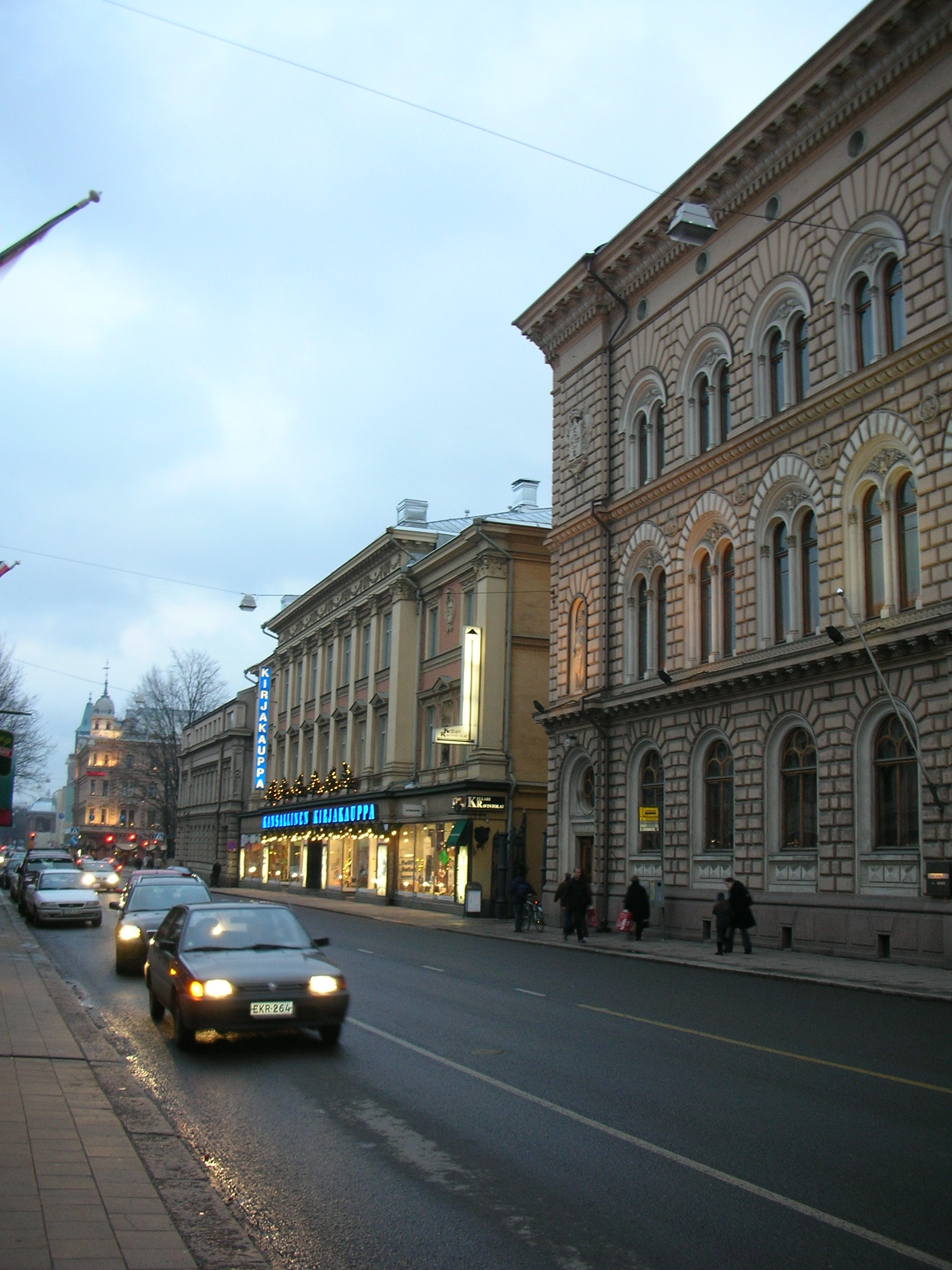 Linnankatu in Turku, Finland.